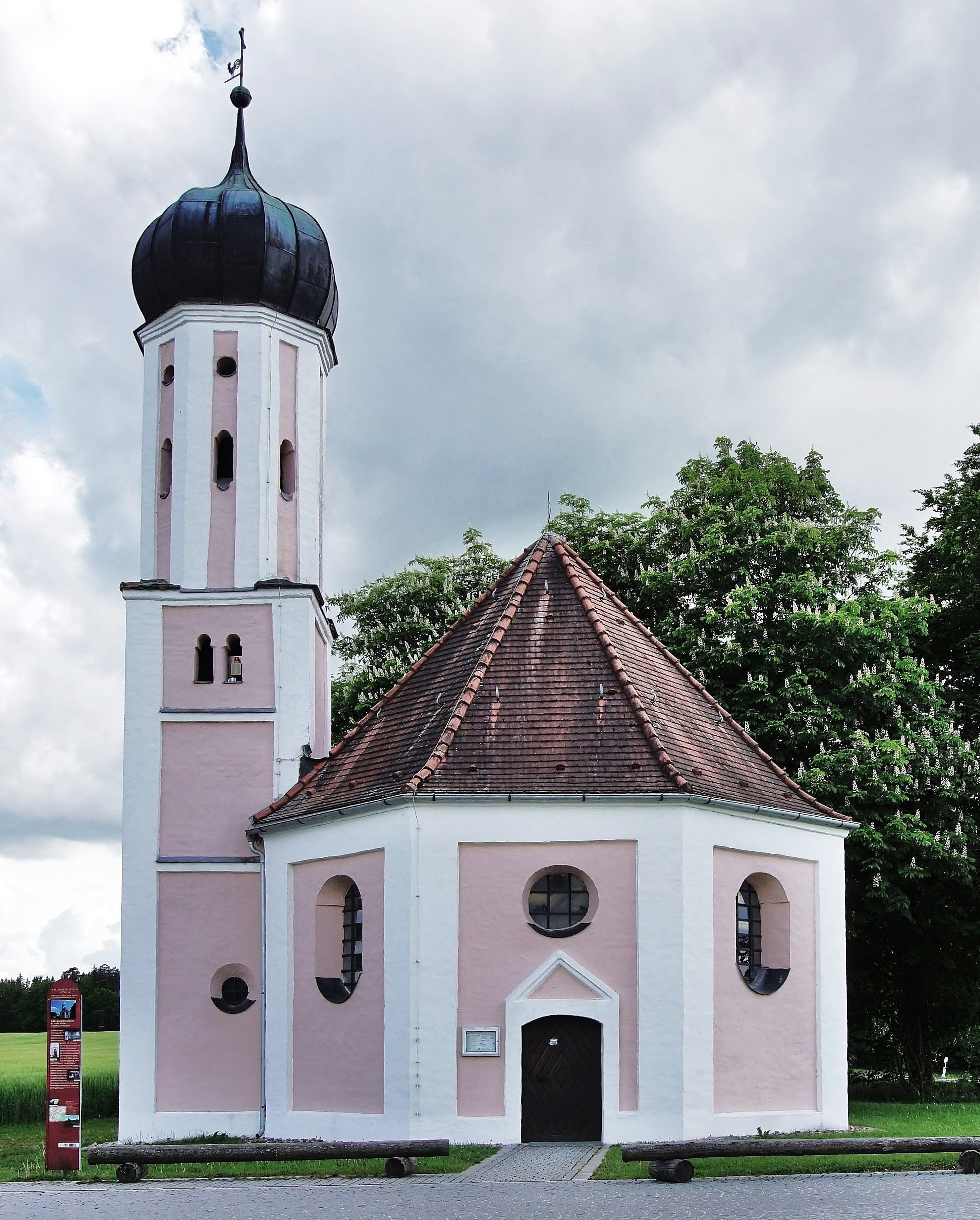 St. Salvator (Adelzhausen), Südansicht